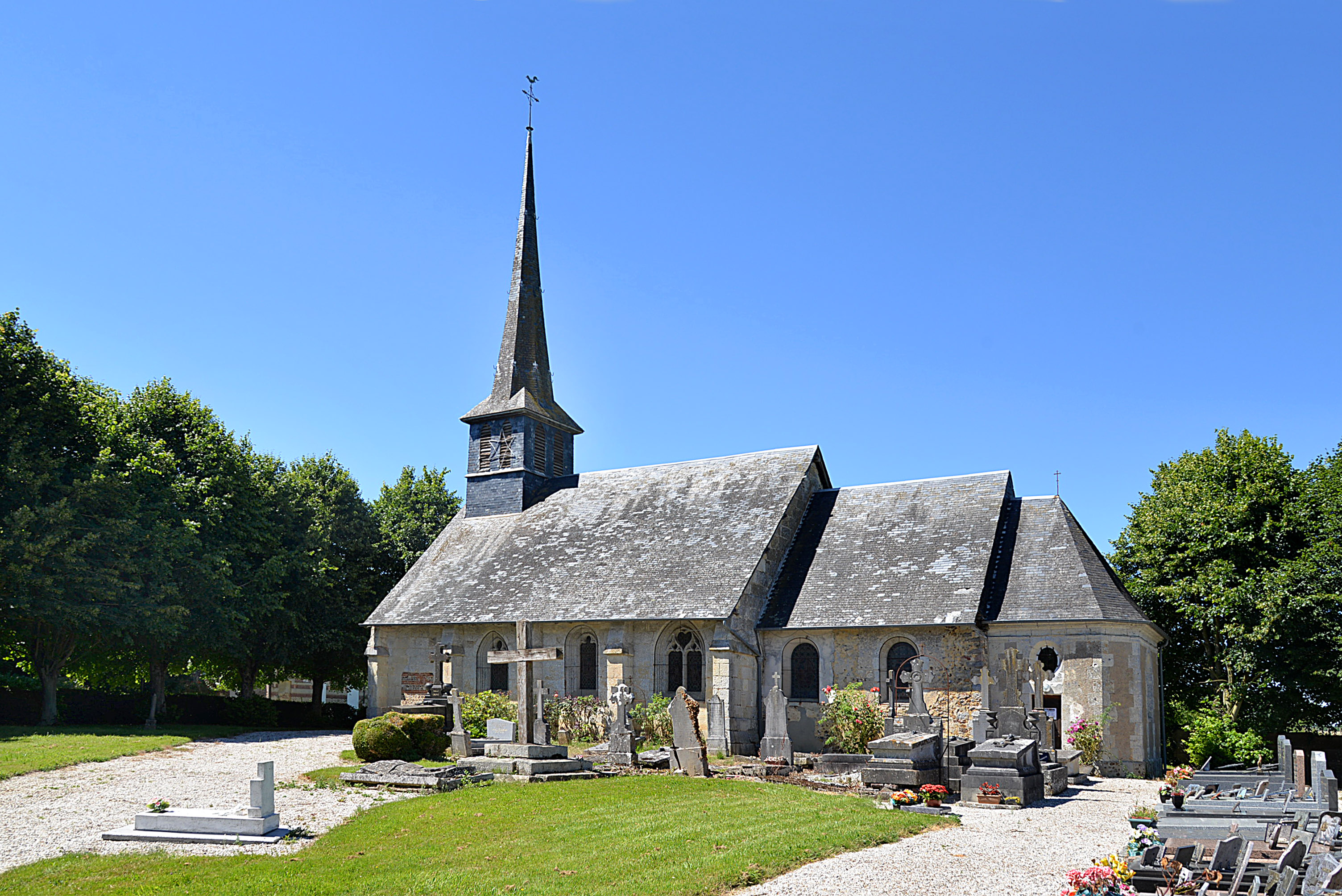 Familly (Calvados)